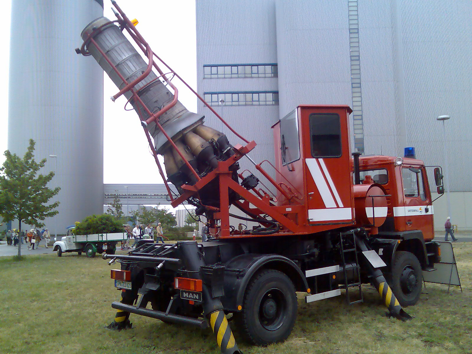 Abgaslöschfarzeug Vattenfall Europe Mining AG auf MAN, Ansicht der Rückseite